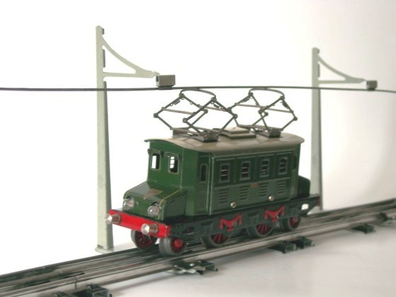 Kraus Fandor Oberleitungslok